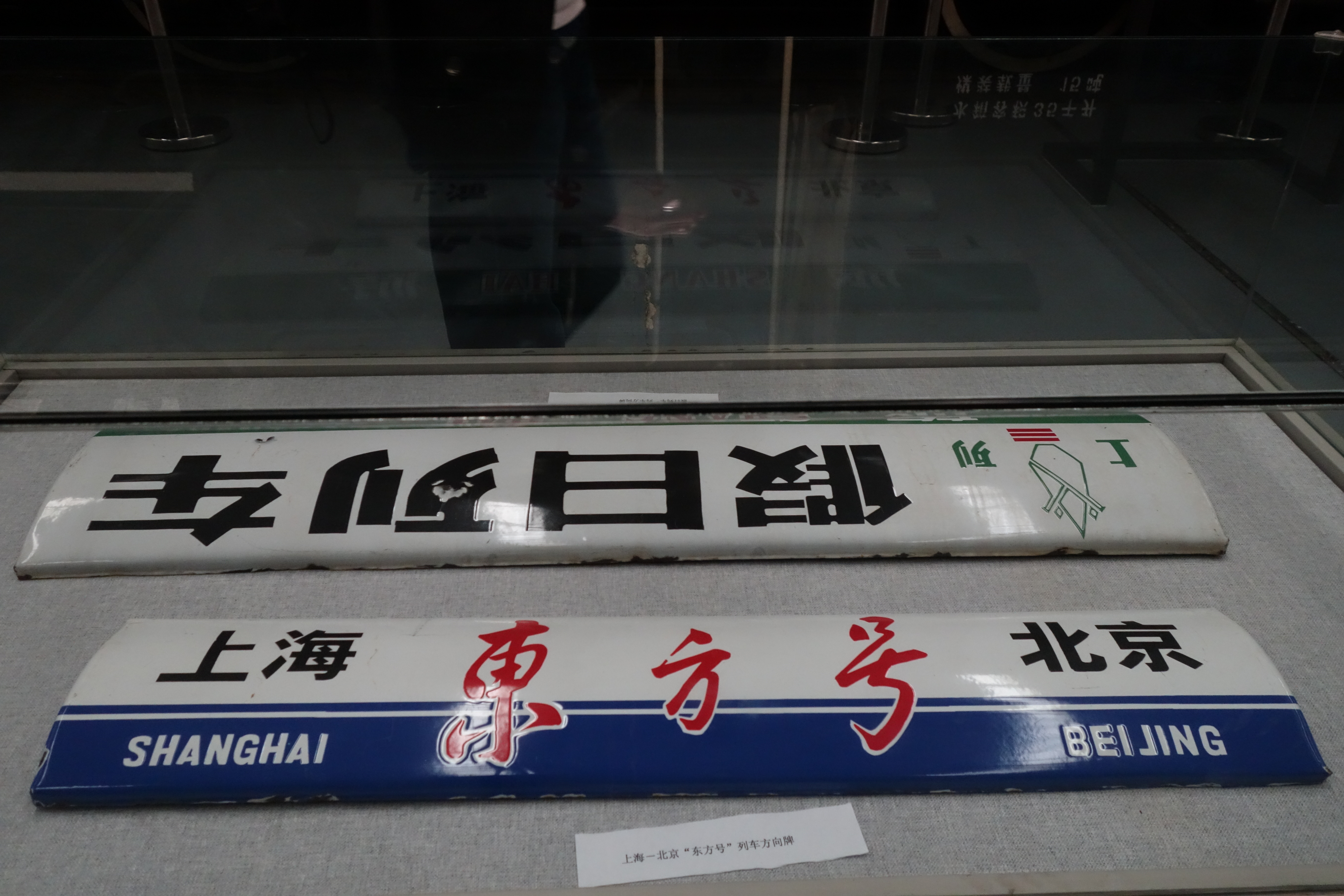 13/14次（东方号）水牌，中国铁道博物馆